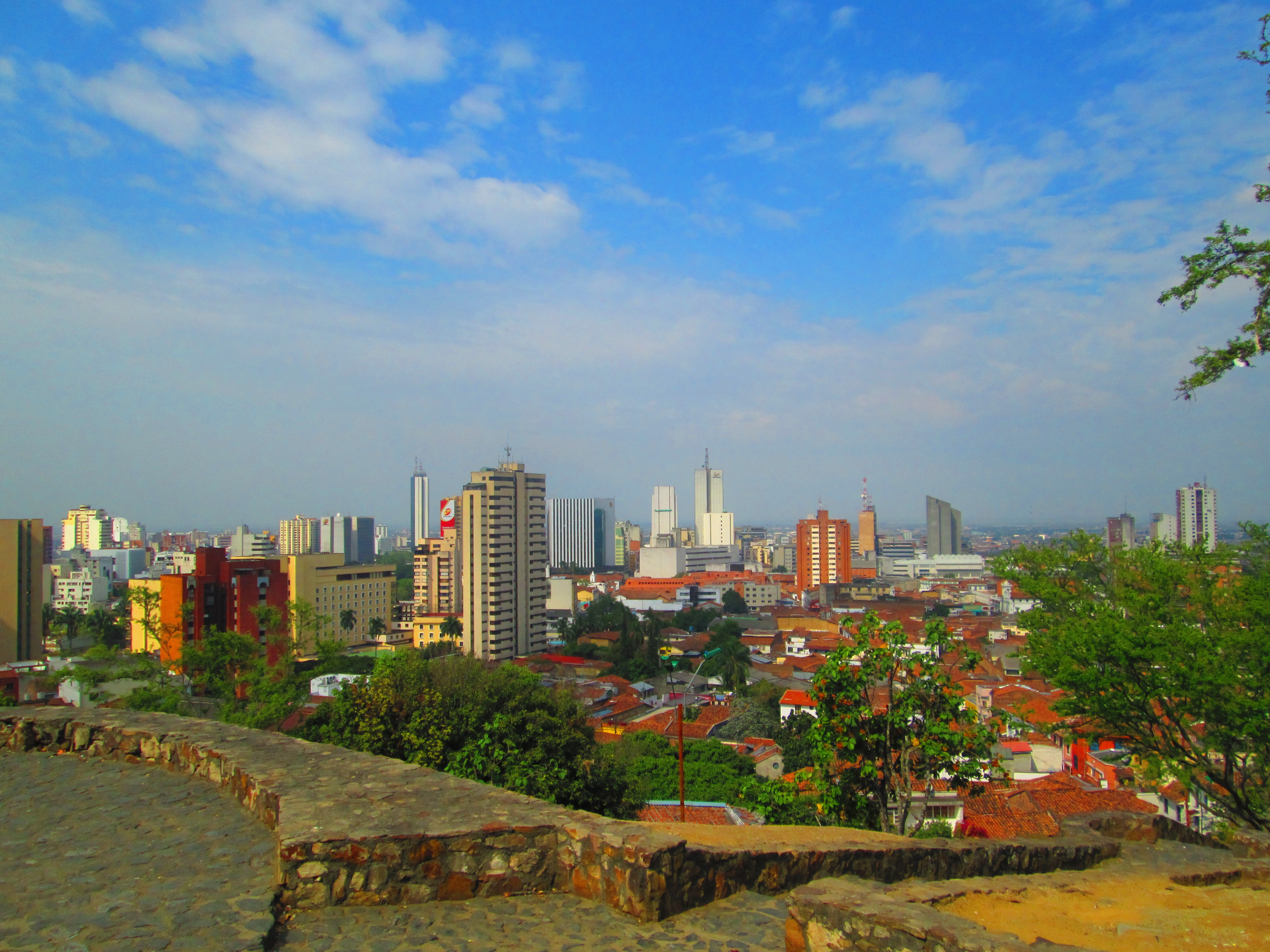 Vista desde el cerro de san antonio, cali ,colombia